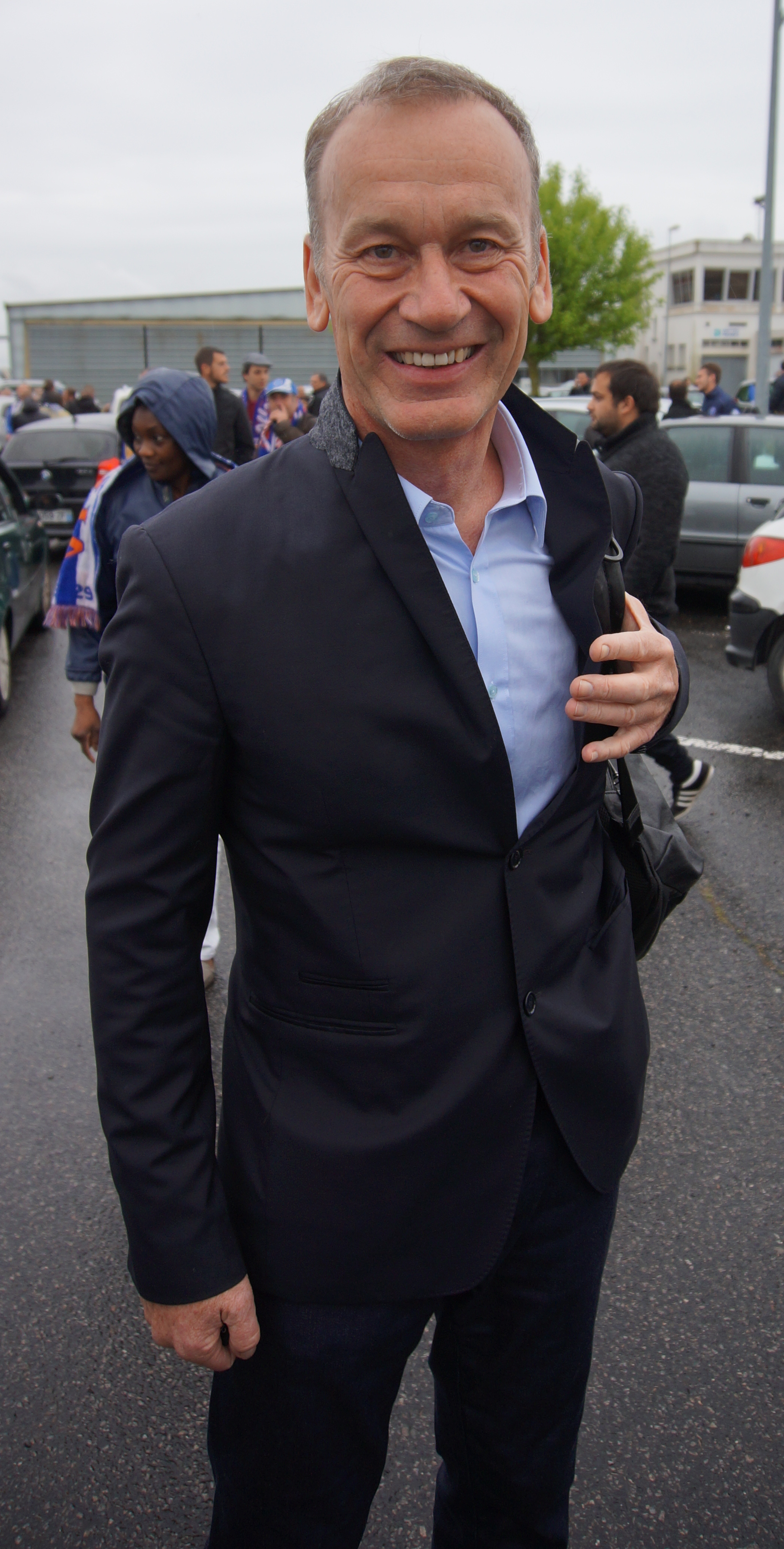 Jean-Marc Furlan en mai 2015, alors entraîneur de l'ESTAC.